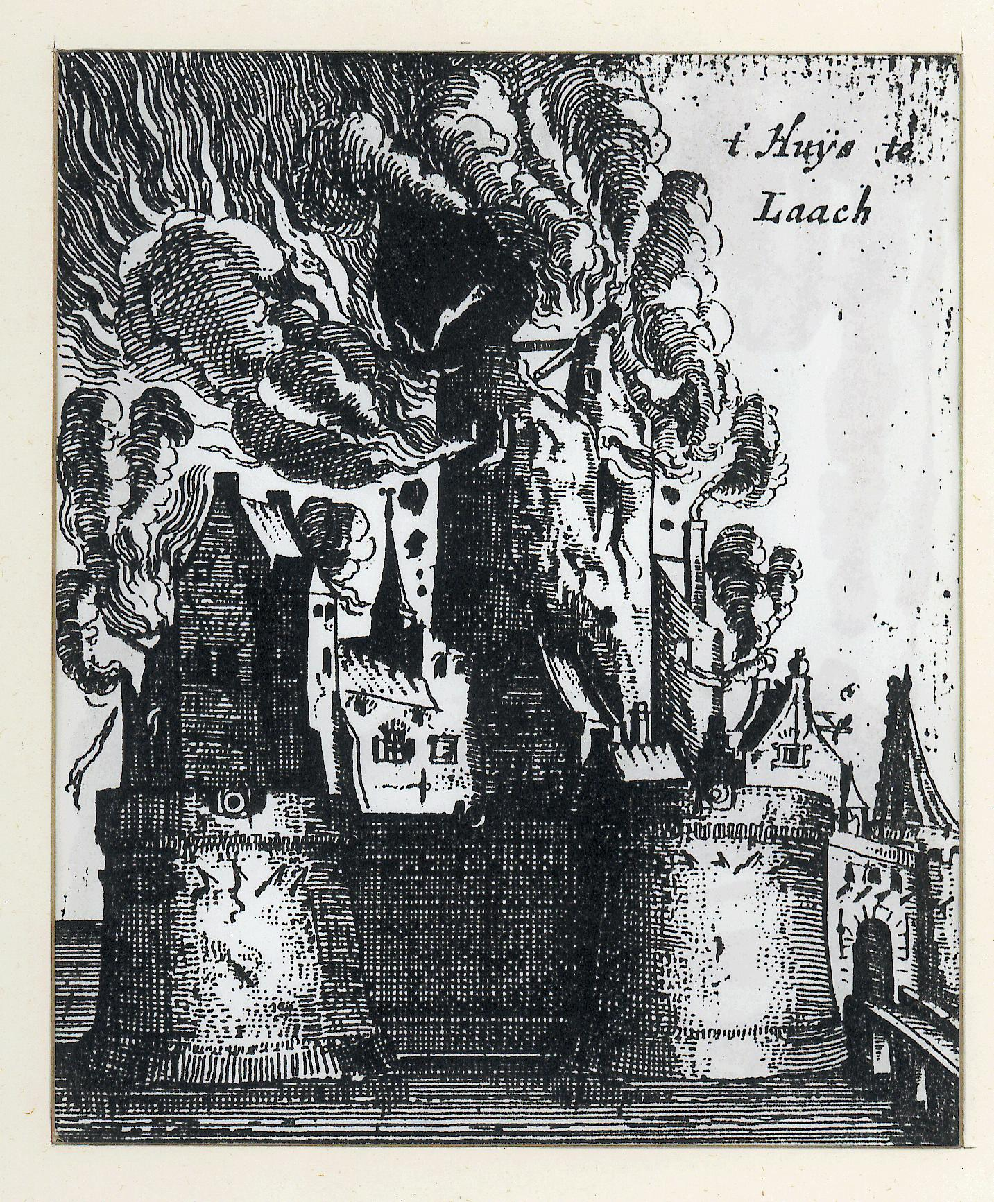 Stich von I. Commelin: Sprengung der Burg Lage 1626, Amsterdam 1650